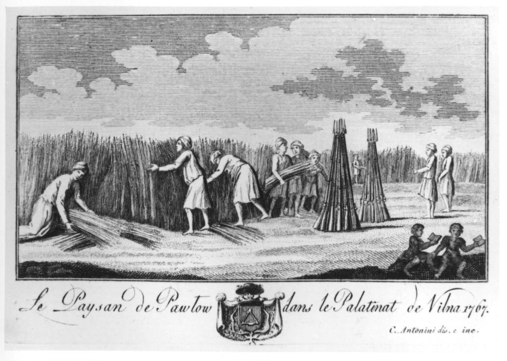 „Rzeczpospolita Pawłowska”, grafika ze zbiorów Biblioteki Narodowej w Warszawie.